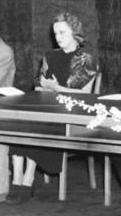 Zentralbild Quaschinsky 2 Motive 4.10.1954 Matinee in der Volksbühne - Deutsche Dichter sprechen Eine Programmfolge durch das Schaffen zeitgenössischer Schriftsteller und Dichter brachte eine Matinee des Schriftstellerverbands der DDR am Sonntag, dem 3. Oktober 1954 in der Volksbühne Berlin. UBz: Blick auf die Bühne, v.l.n.r.: Bode Uhse, Schriftsteller, Theo Harych (Heinrich Mann-Preisträger), Anna Seghers, Nationalpreisträgerin und Trägerin des Friedenspreises, Stephan Heym (Heinrich Mann-Preisträger), Manja Behrens, Schauspielerin, Erwin Strittmatter, Nationalpreisträger und der Schauspieler Franz Kutschera.